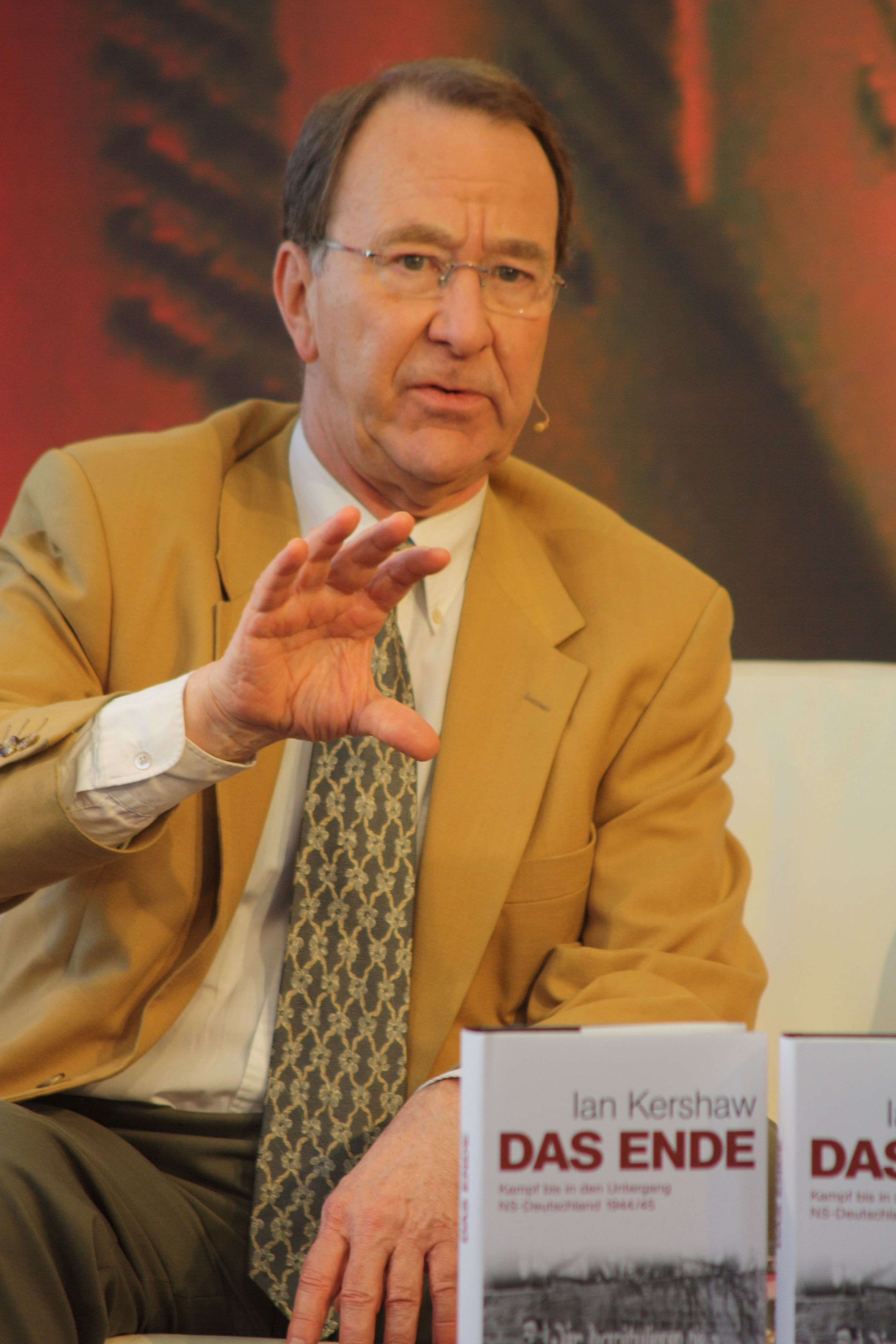 Historiker und Autor